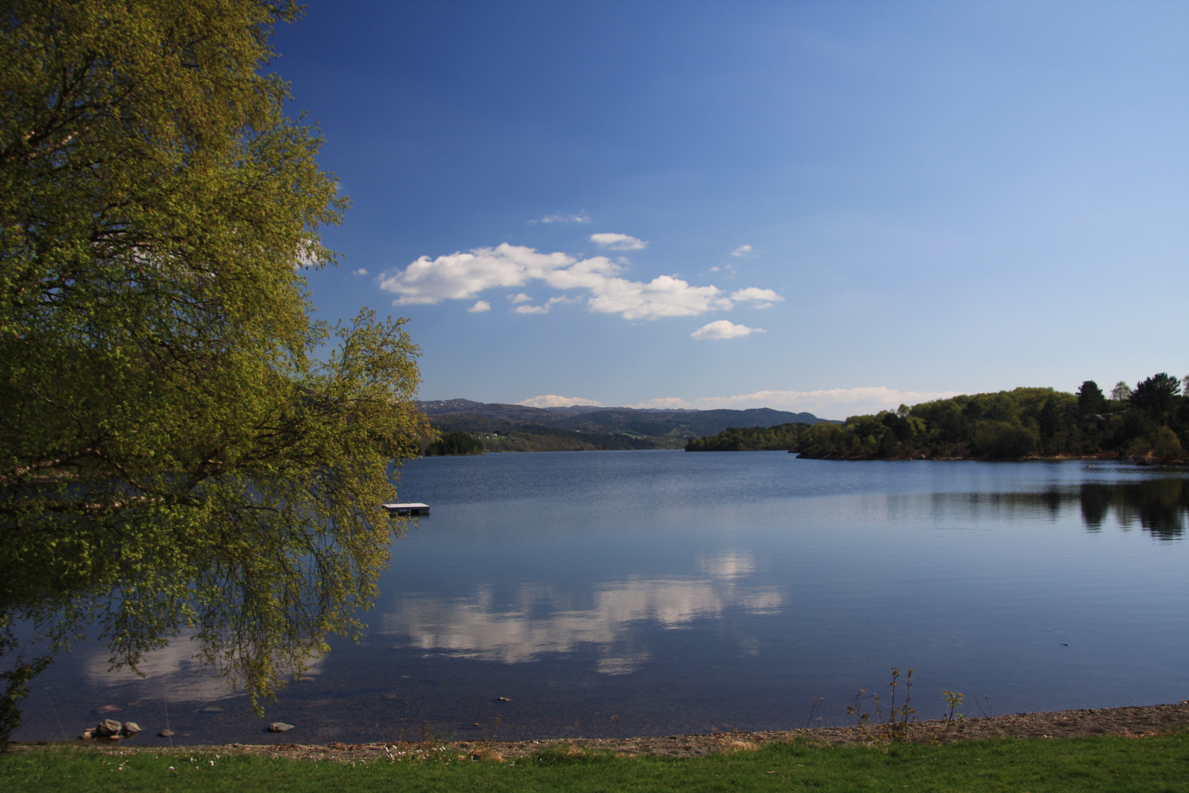 Storavatnet (Fitjar)